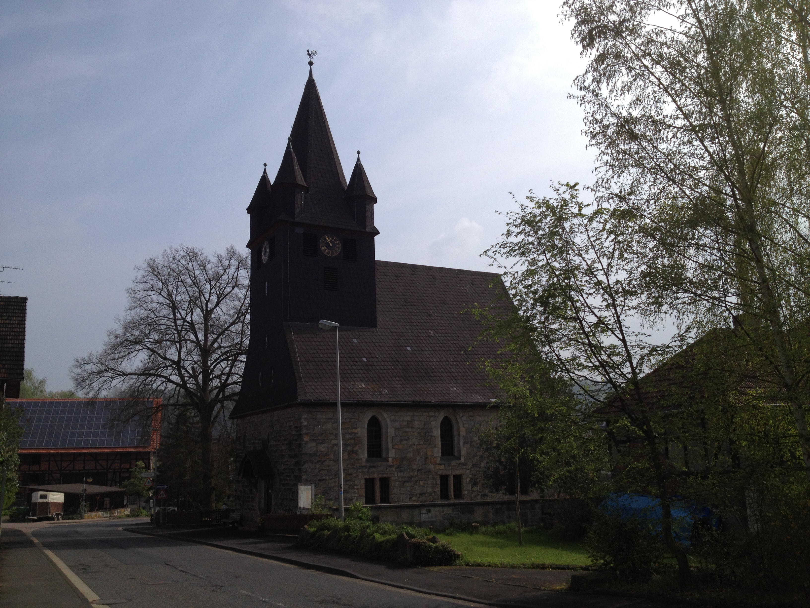 Eco Pfad Kulturgeschichte Guntershausen, Kassel-Steig, Baunapfad